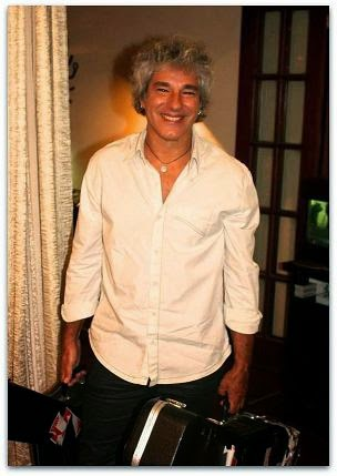 Fred Nascimento - Marbles - foto01